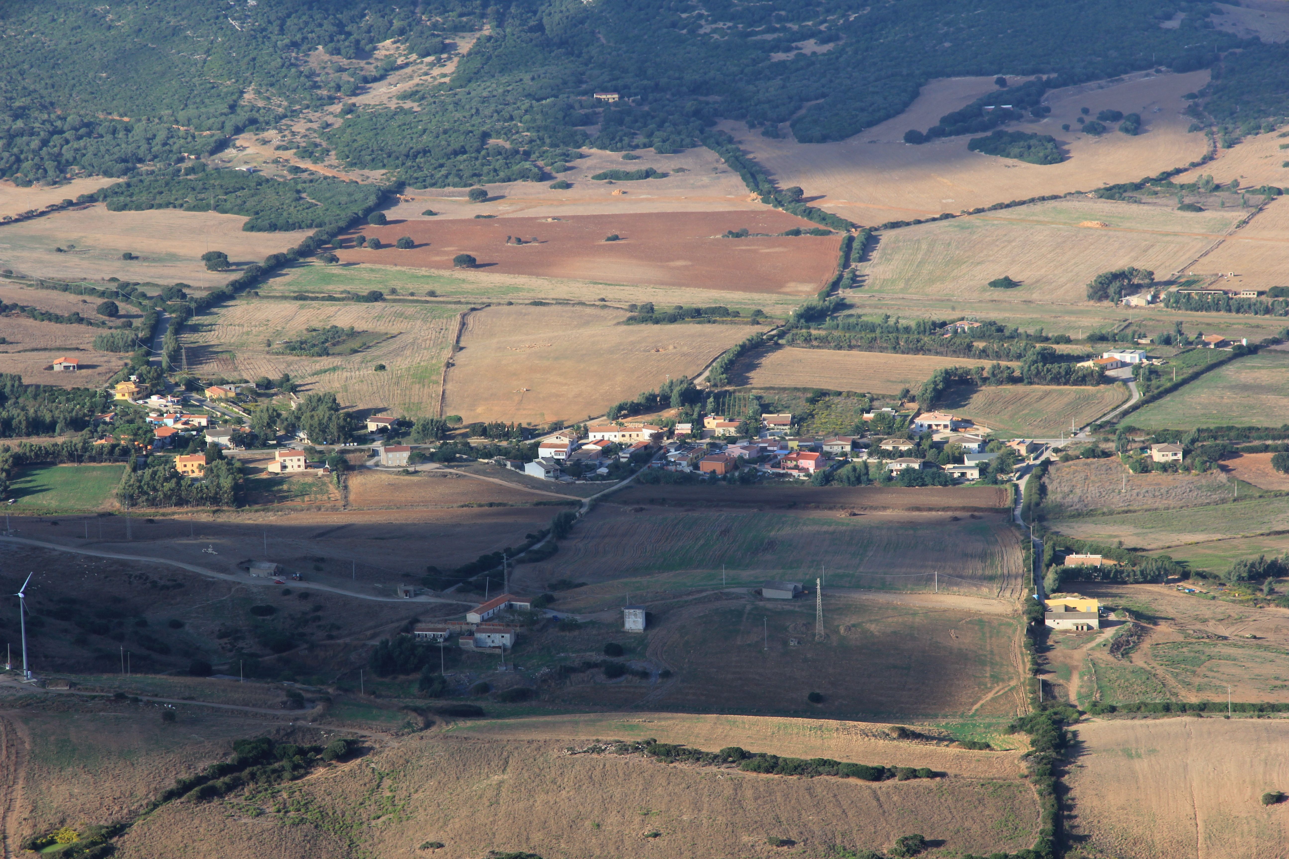 Sassari